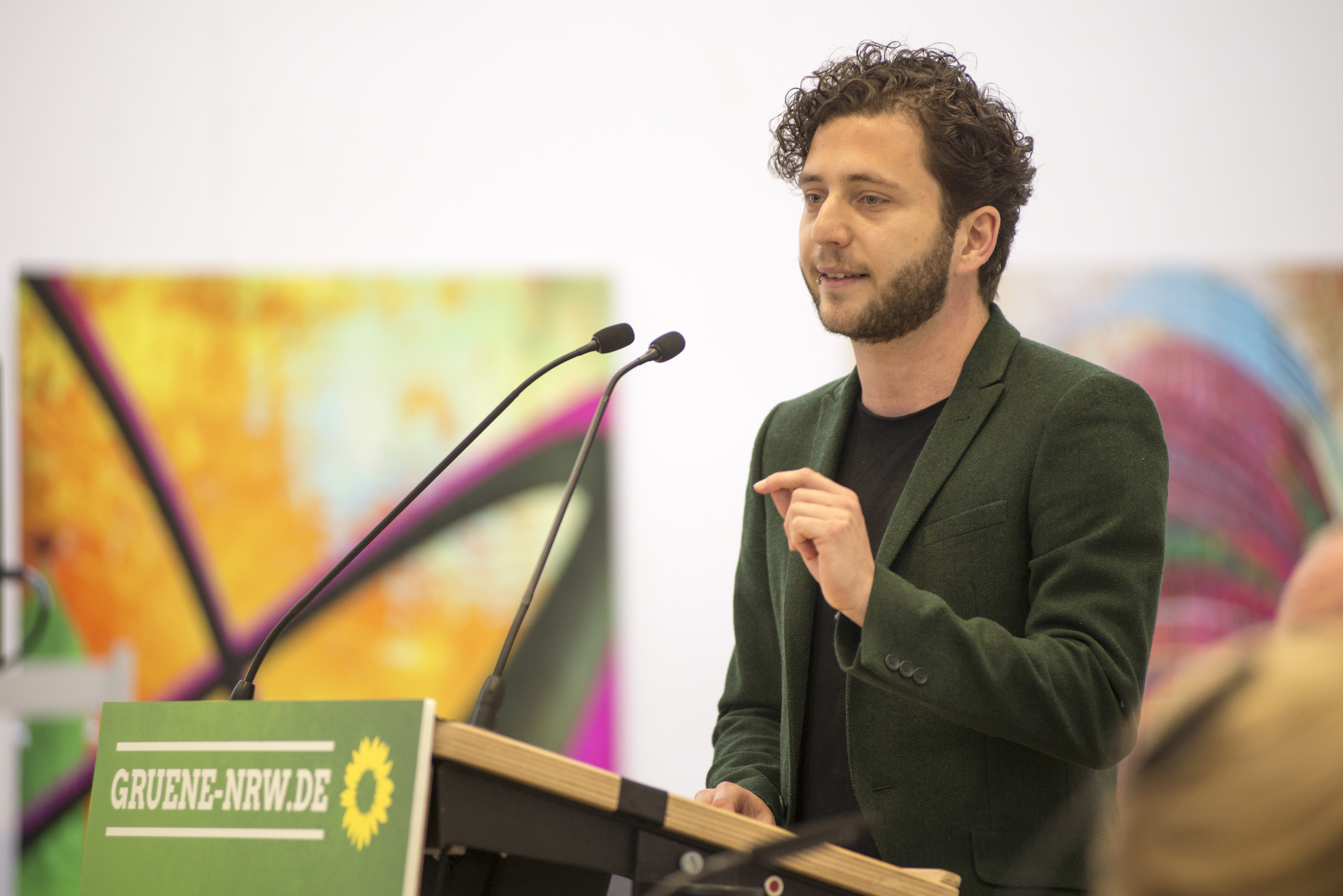 Dieser LPR ist ein weiterer Schritt auf dem Weg zum Abschluss der Strukturreform zum Landesvorstand. Nachdem wir auf der Landesdelegiertenkonferenz (LDK) im Januar ein Eckpunktepapier beschlossen und auf dem Grünen Forum weitere Schritte diskutiert haben, werden wir euch zum LPR konkrete Modelle vorlegen, die dann als Empfehlung für die LDK im Juni dienen. Zudem werden wir zwei aktuelle Themen aus der Landespolitik auf die Tagesordnung setzen und mit euch unsere Position zu zwei schwarz-gelben Vorhaben beraten: Die Eckpunkte zum neuen „Hochschulfreiheitsgesetz“ sowie die Leitentscheidung für G9 an Gymnasien. Im Anschluss an den LPR laden wir zur Diskussion über die aktuelle politischen Lage in Syrien ein. „NATO-Partner Türkei und der völkerrechtswidrige Angriff auf Afrin: Nicht nur ein türkisch-kurdischer Konflikt?“ mit Vertreter*innen aus Wissenschaft, Politik und Zivilgesellschaft. Beginn 14.30 h, bis 16:30 h. Der völkerrechtswidrige Einmarsch der Türkei bewegt uns alle. Im Anschluss an den Landesparteirat möchten wir deshalb – mit einem Input des Journalisten Jan Jessen und anschließender Podiumsdiskussion mit Berivan Aymaz MdL, Metin Incesu (NAVEND – Zentrum für Kurdische Studien e.V.) und Siggi Martsch (Kurdistanexperte) – den militärischen Einsatz der Türkei in Afrin und die politischen Entwicklungen in Syrien bzw. der gesamten Region aufgreifen. Welche Gefahren und neuen Konfliktlinien sind entstanden? Wie hat sich die politische Tektonik in der Region verändert? Und: Handelt es sich beim völkerrechtswidrigen Einmarsch der Türkei in Nordsyrien nur um eine neue Dimension des türkisch-kurdischen Konflikts? Diskussion mit Jan Jessen, Journalist Berivan Aymaz MdL Metin Incesu, NAVEND – Zentrum für Kurdische Studien e.V. Siggi Martsch, Kurdistan-Experte